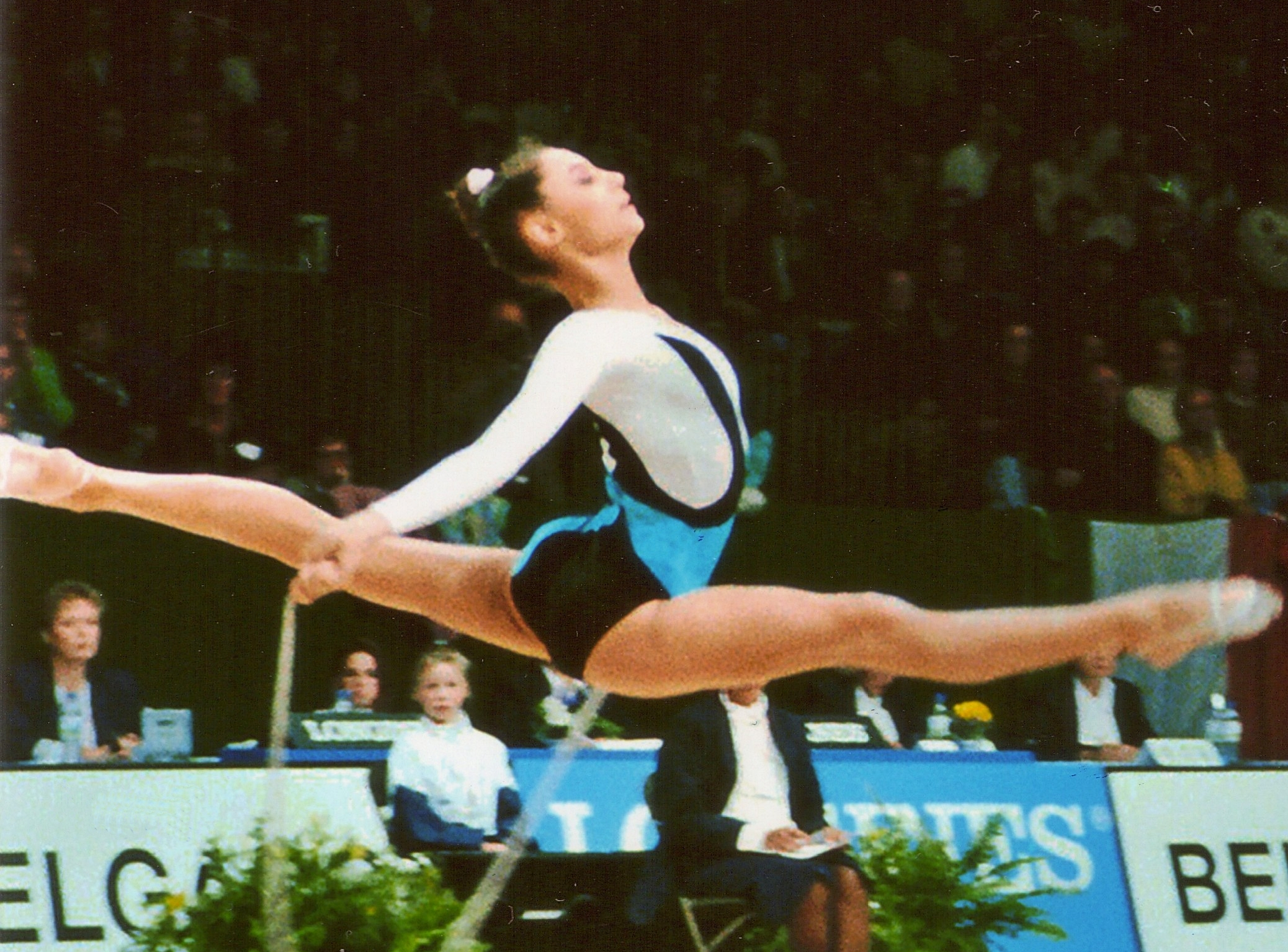 La gimnasta española Amaya Cardeñoso en el Campeonato Mundial de Bruselas en 1992.